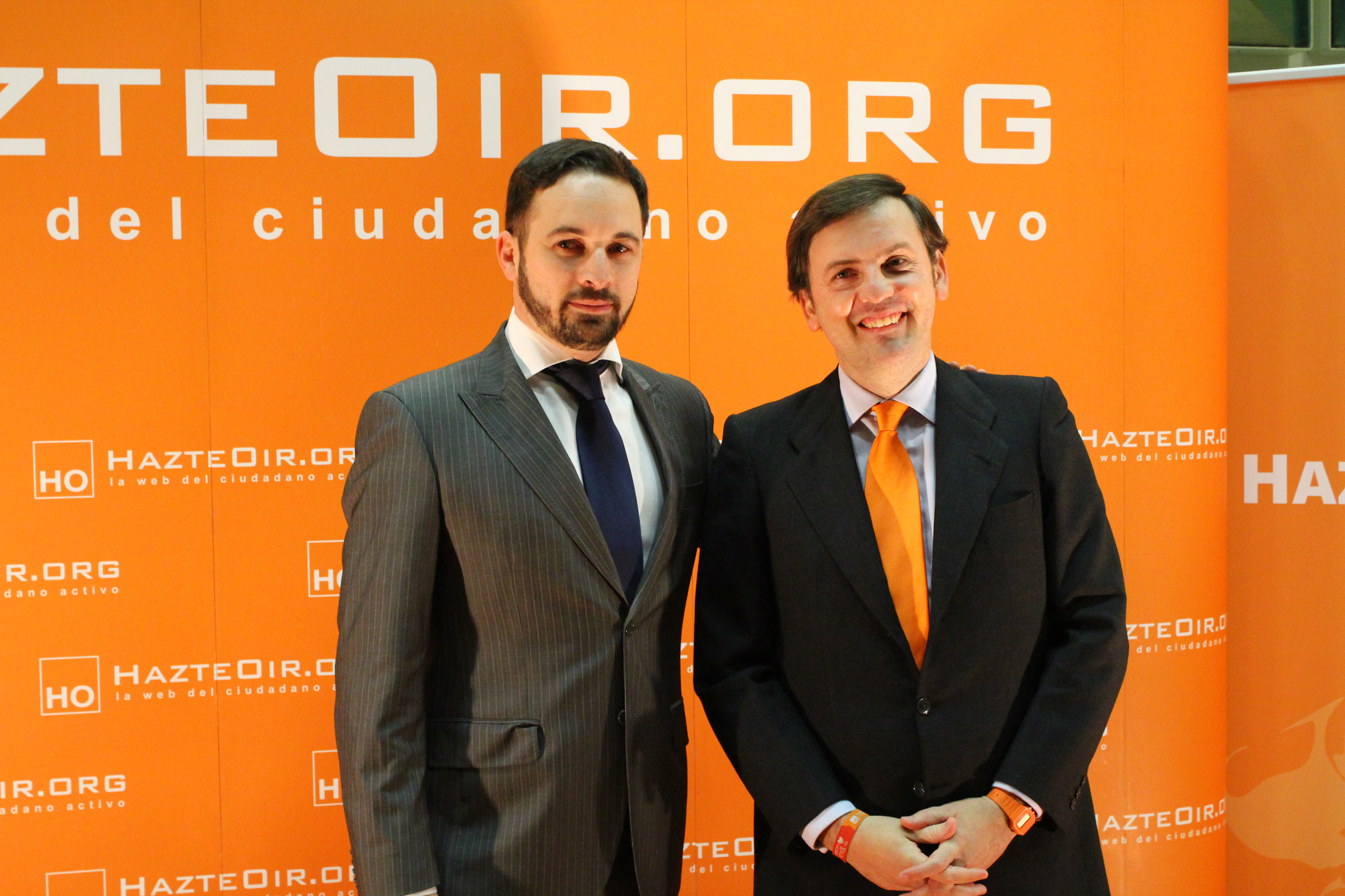 Ceremonia de entrega de los Premios 2012. Madrid, 15 de diciembre de 2012.